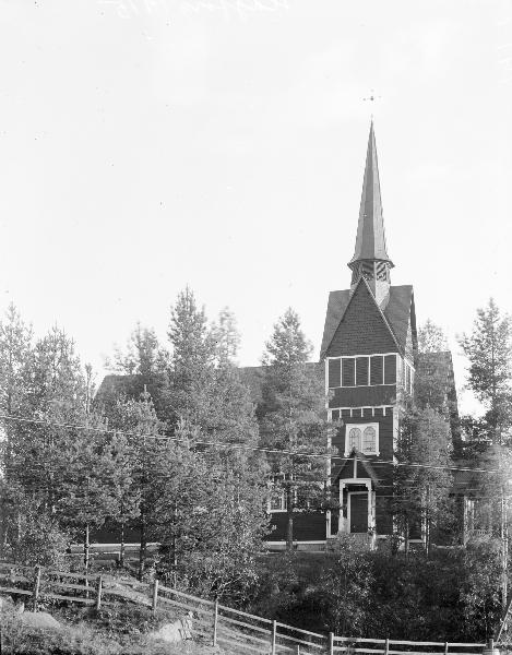 Hagfors kyrka